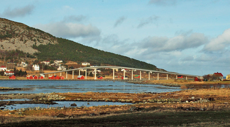 Remøybrua